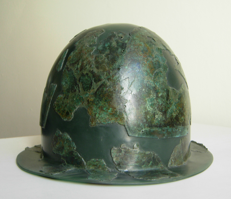 Elmo a calotta composta di tipo alpino sud orientale. La calotta è formata da tre lamine: una centrale e due laterali fissate fra loro con ribattini. Alla base della calotta si sovrappone la fascia di base che viene a formare una tesa. Questo tipo di elmo è diffuso nella cultura hallstattiana orientale in Slovenia.